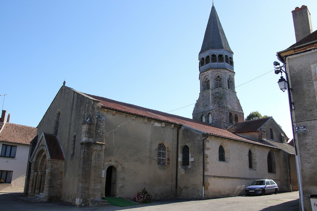 Eglise St Martin de Cérilly vue d'ensemble